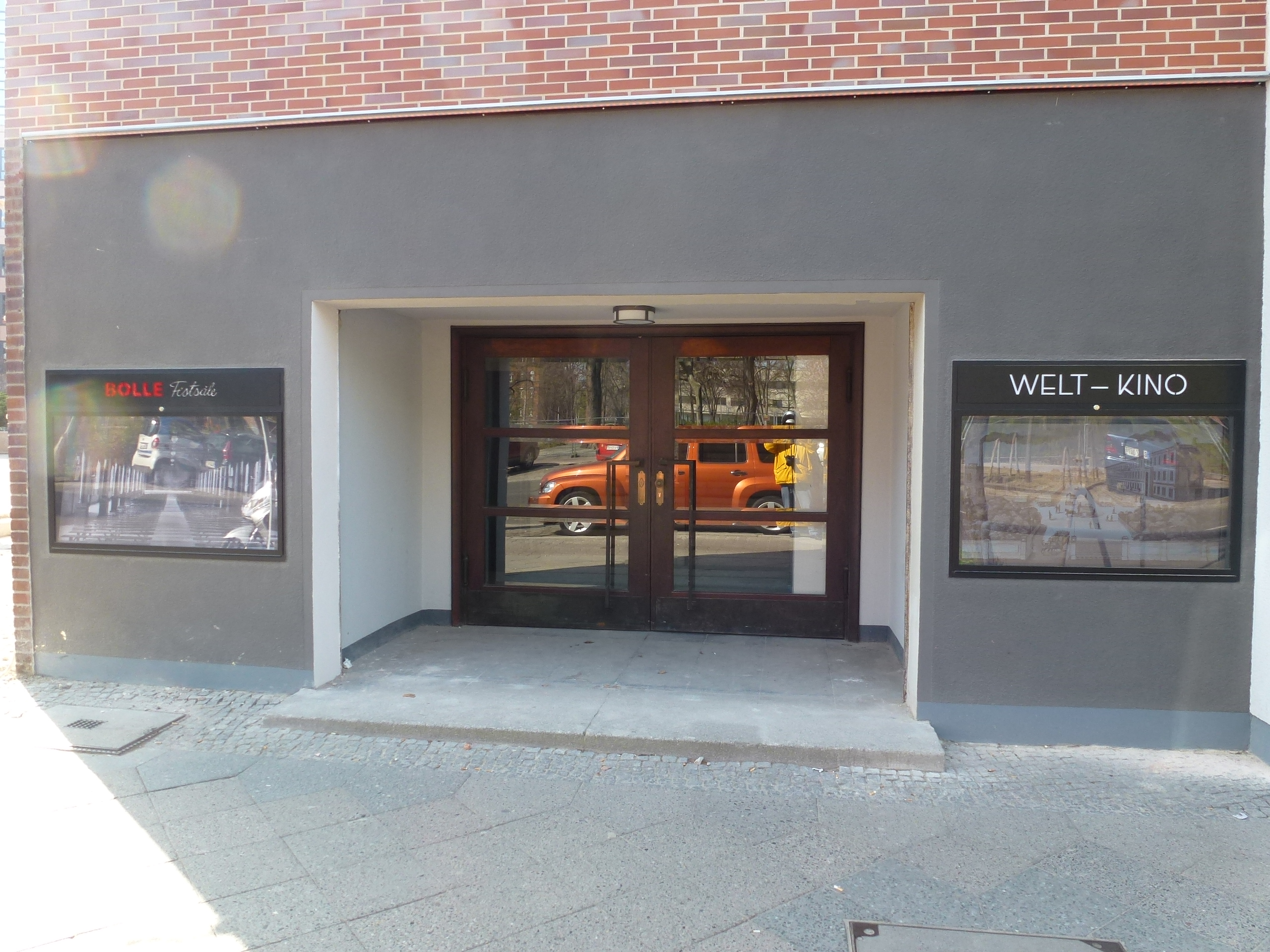 Berlin-Moabit Alt-Moabit Meierei Bolle Welt-Kino